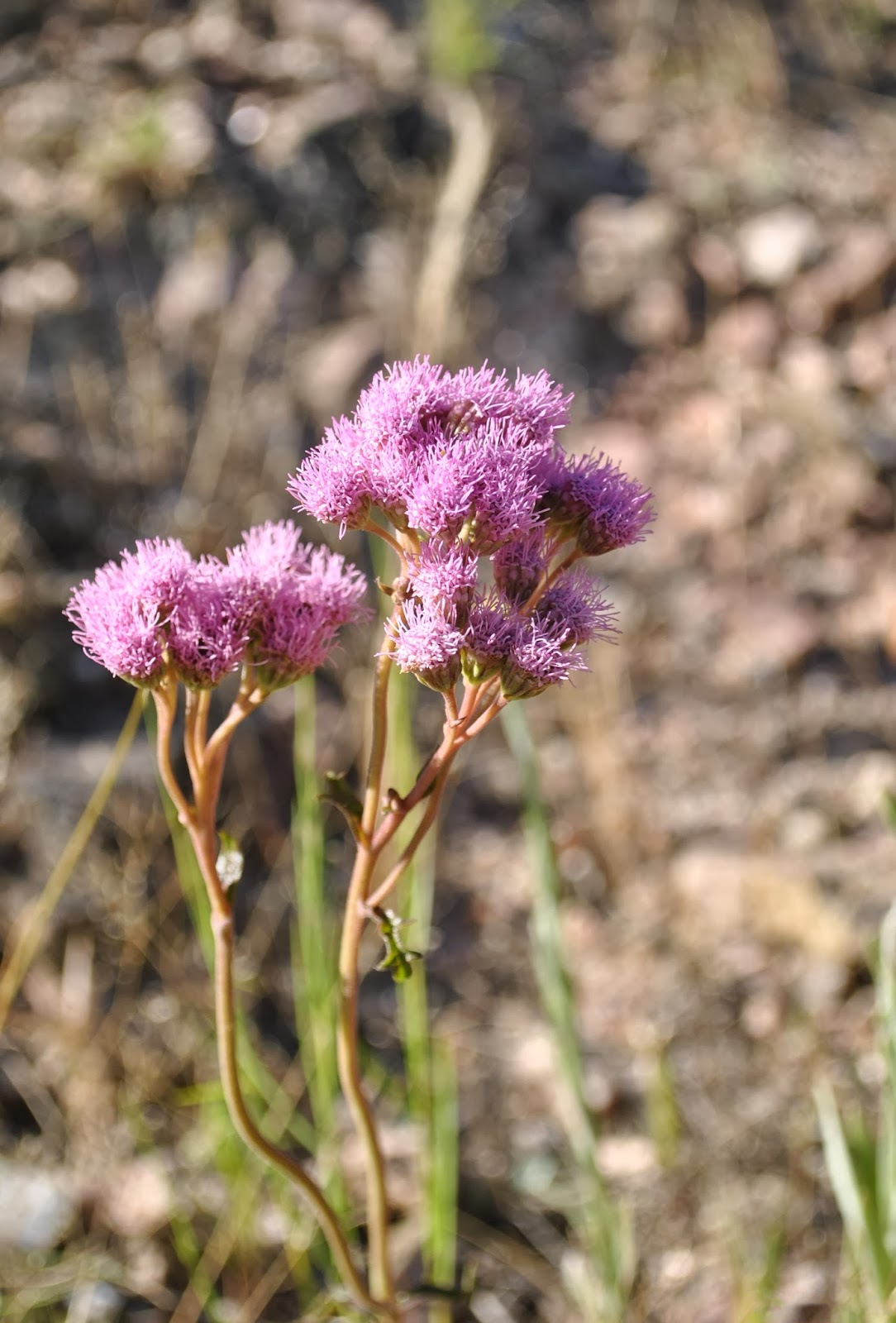 Eupatorium tanacetifolium. Fotos tomadas en suelo pedregoso cercano a Pajas Blancas, departamento de Montevideo, Uruguay.